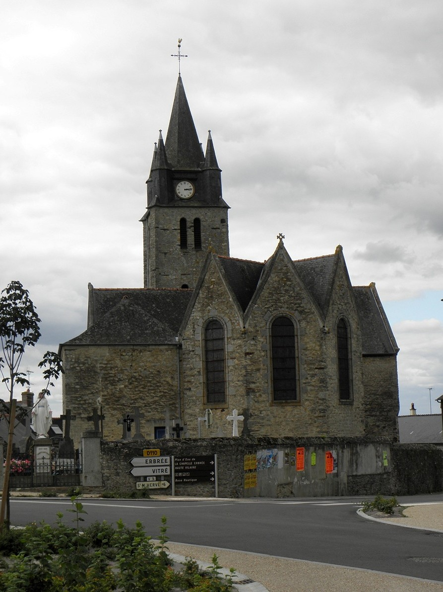 Église paroissiale Saint-Ouen à La Chapelle-Erbrée (35).